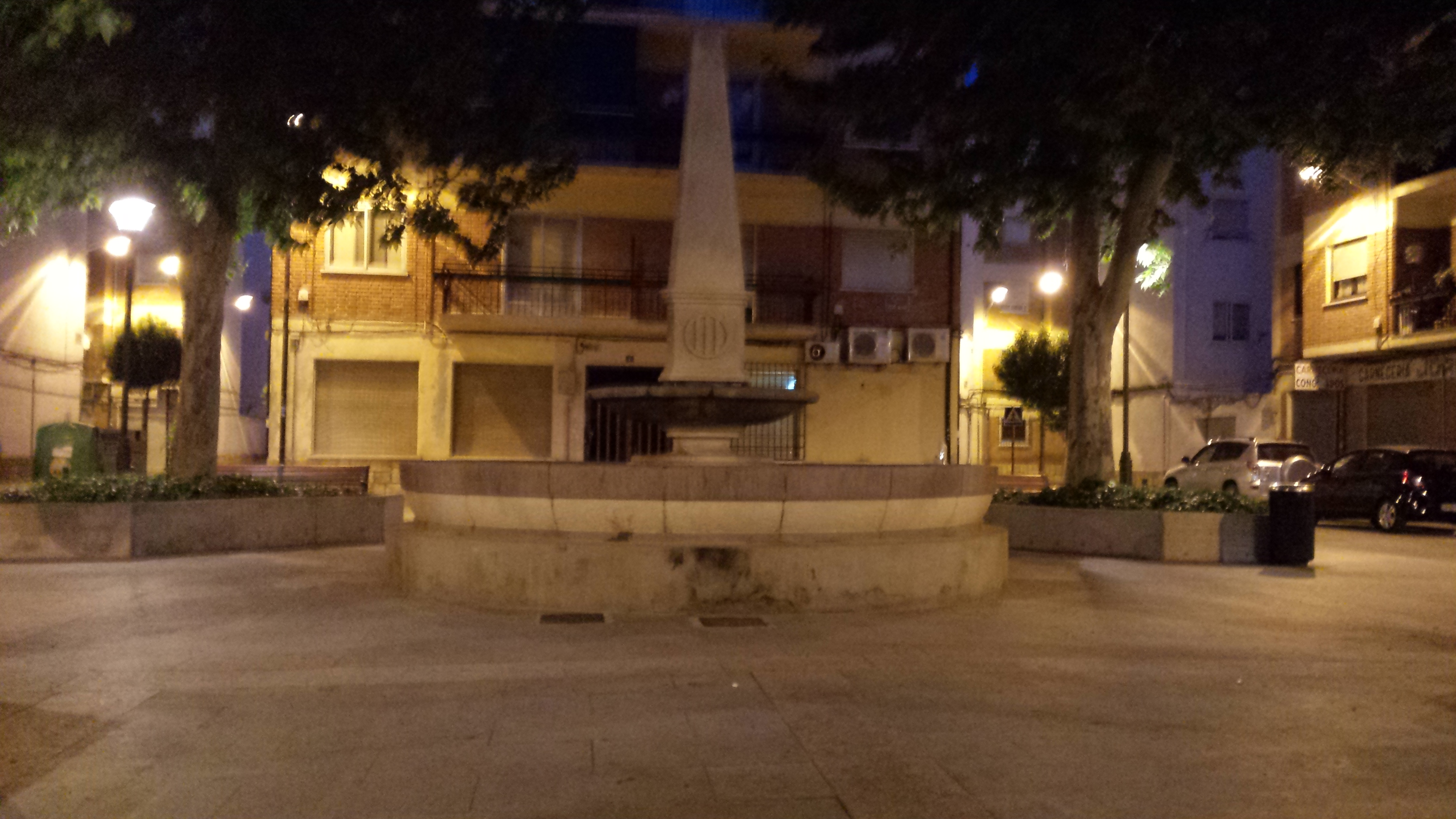 Plaza barrio Pedro Lamata. Albacete